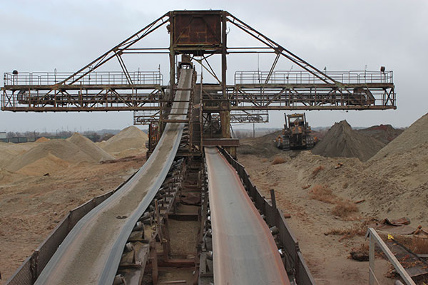 Структура предприятия